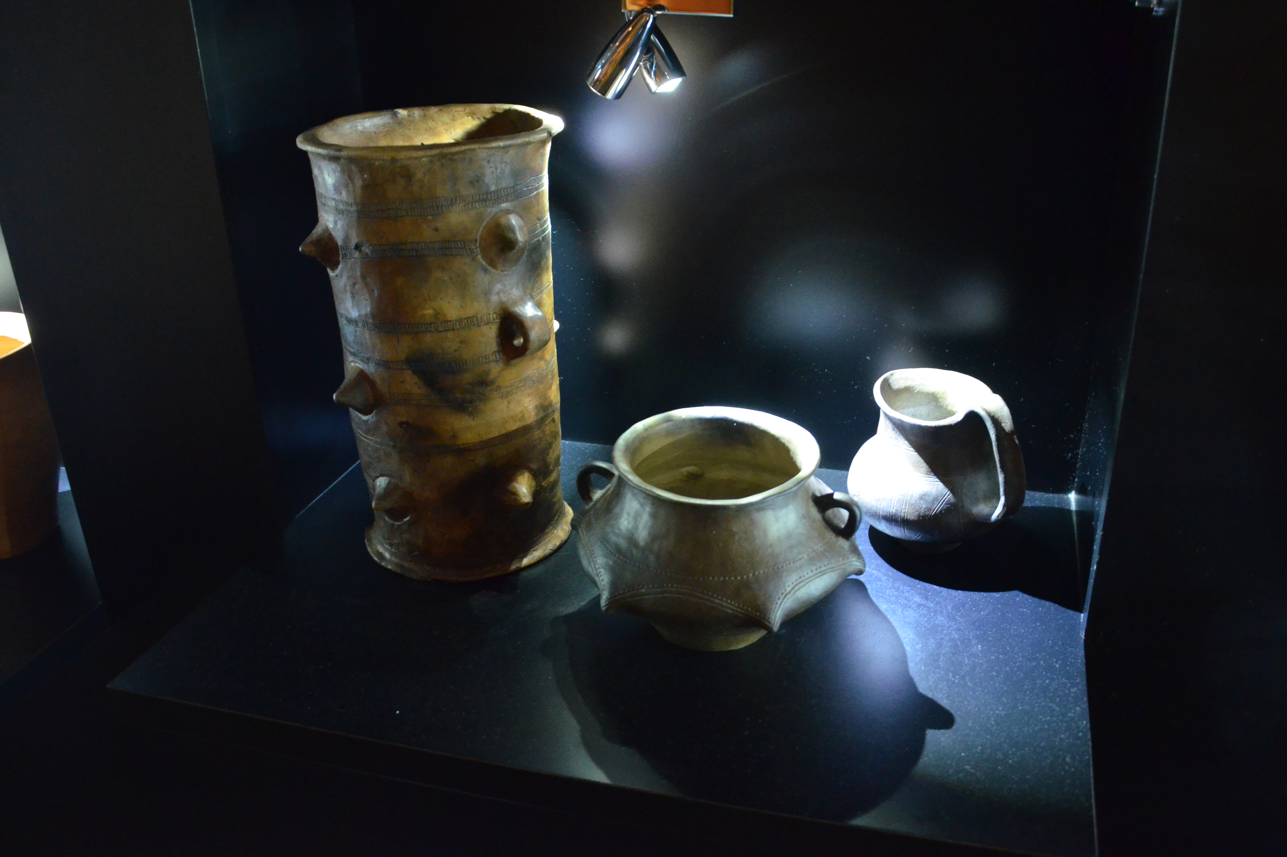 Der Otomani-Füzesabony-Kultur in Beskiden, Trzcinica